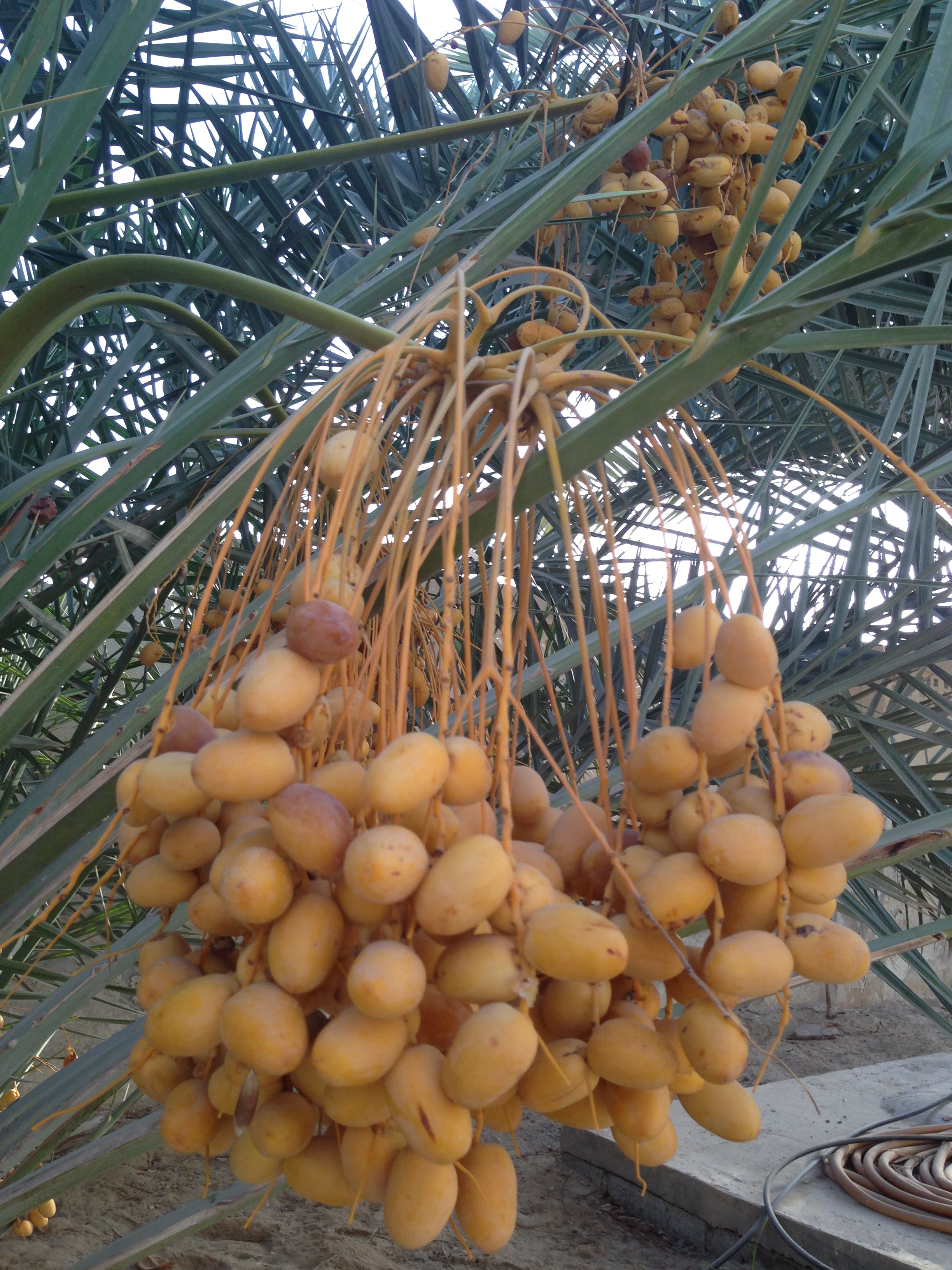 الخلاص (تمر